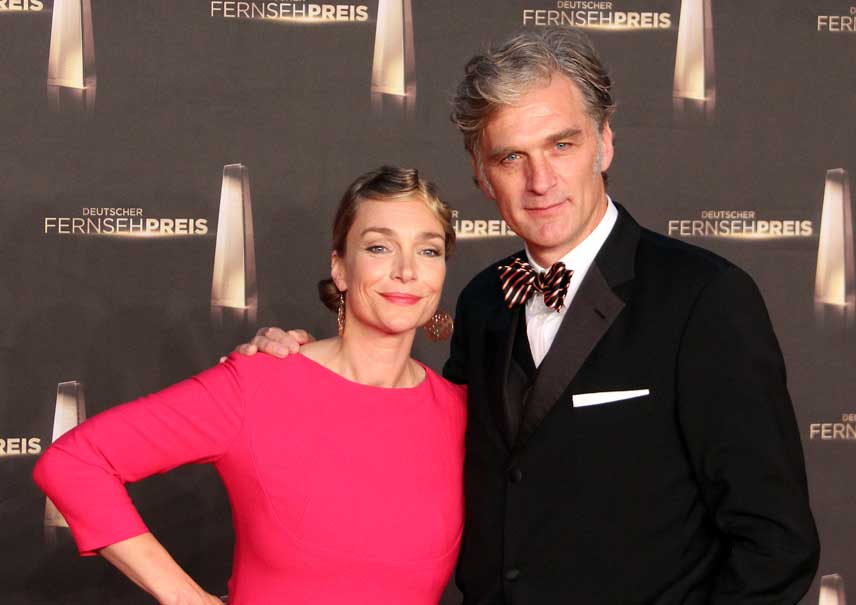 Aglaia Szyszkowitz und Walter Sittler beim Deutschen Fernsehpreis 2012